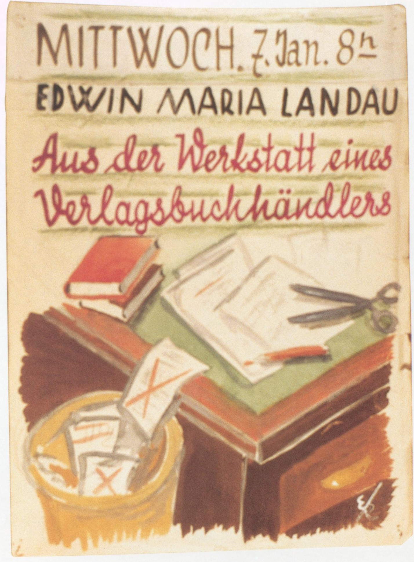 Emmanuel Kirz Edwin Maria Landau Aus der Werkstatt eines Verlagsbuchhändlers